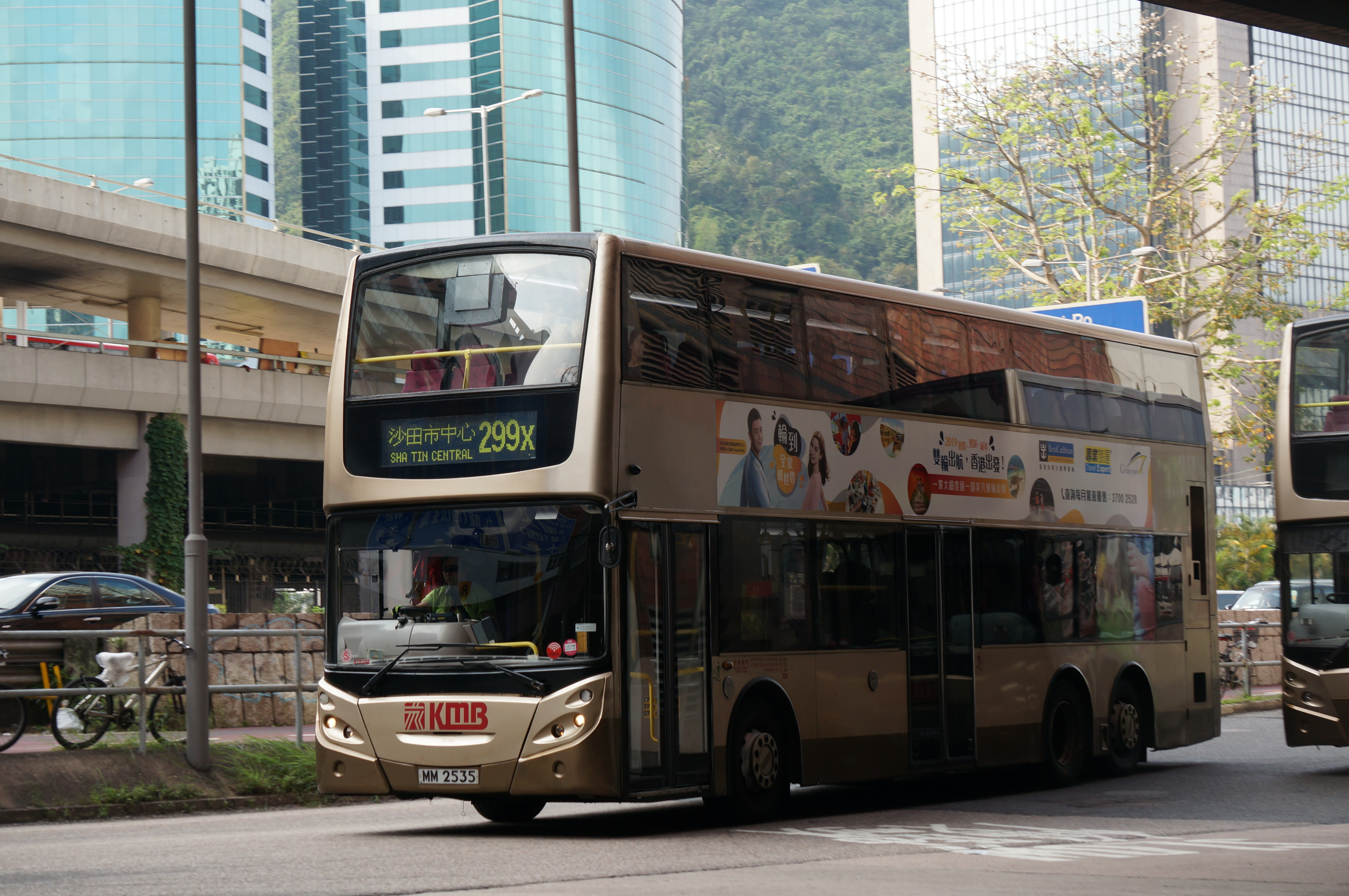 （MM2535/ATE258）行走九龍巴士299X線